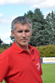 Stéphane Grégoire lors d'une journée à l'USM Saran.